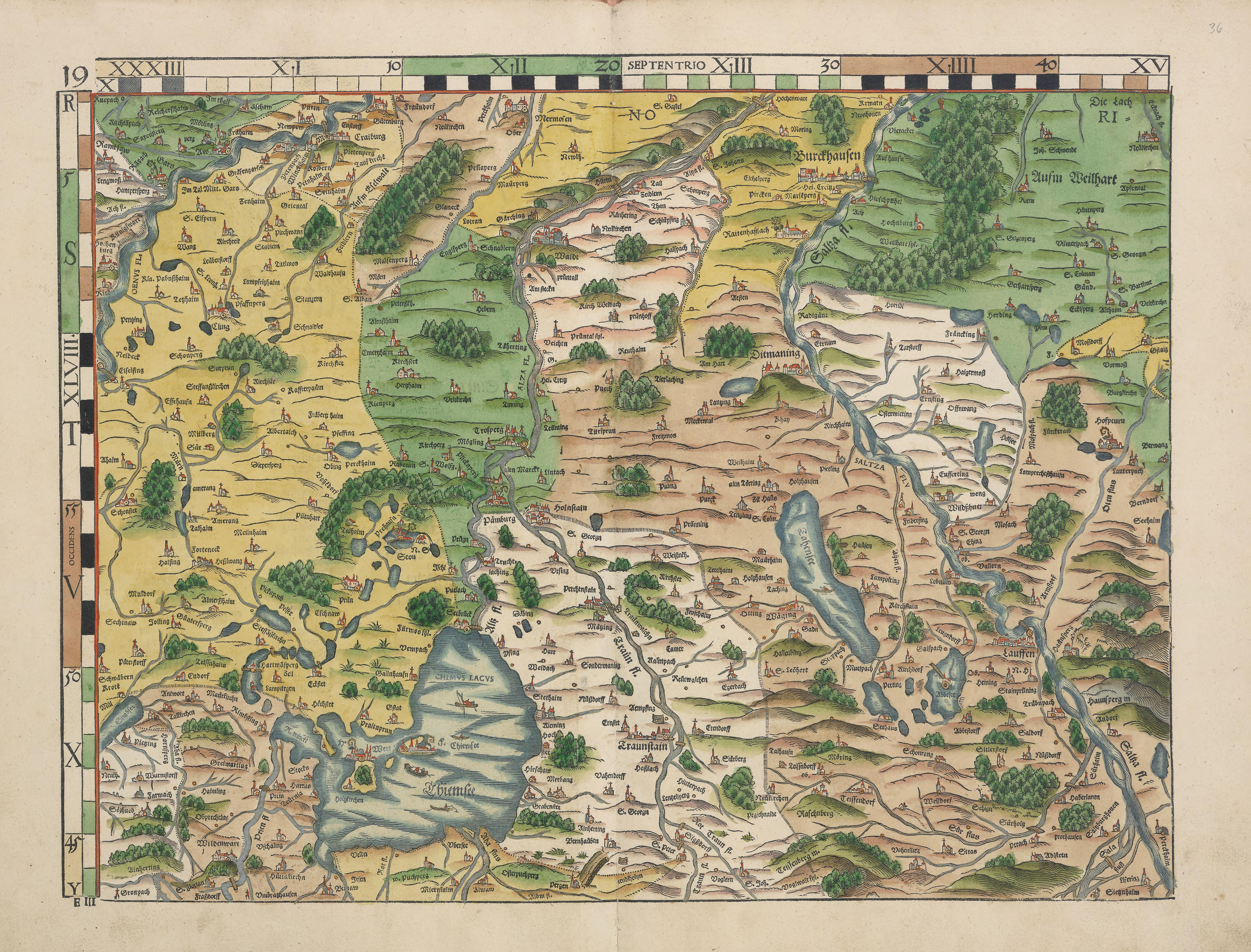 Philipp Apian - Bairische Landtafeln von 1568 (Tafel 19) ca. 1:140.000, Gesamtgröße des Originals 156 x 159 cm, je Blatt 43 x 33 cm Auf der Basis der „Großen Karte“ ließ Philipp Apian 1566 von Jost Amman Holzschnitte im kleineren Maßstab von 1:144.000 anfertigen. Diese so genannten Bairischen Landtafeln, aufgeteilt in 24 Holzschnitte, verlegte Apian in seiner eigenen Druckerei. Die Genauigkeit der Landkarten wurde erst im 19. Jahrhundert übertroffen. Noch Napoleon benutzte sie für den Einmarsch in Bayern. Ein Originaldruck der Karte ist im Stadtmuseum Ingolstadt ausgestellt, die Druckstöcke befinden sich heute im Bayerischen Nationalmuseum in München. Abraham Ortelius verbreitete kolorierte Kupferstiche dieser Landtafeln in Buchform „ex tabula Philippi Apiani“.